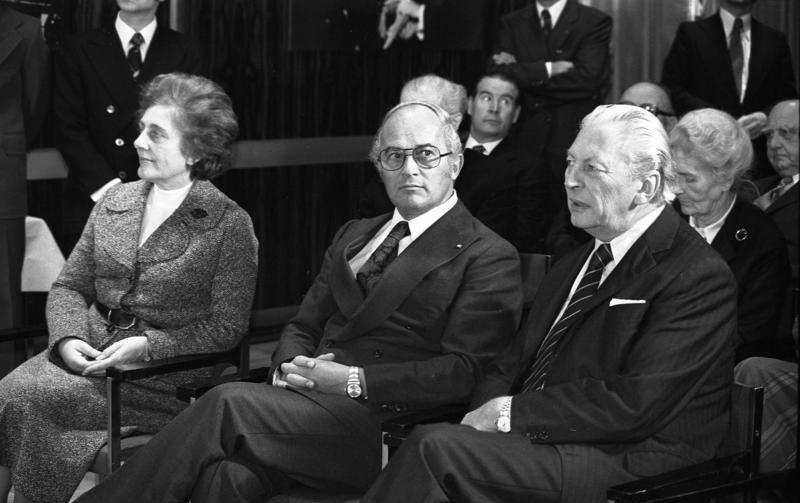 Empfang "25 Jahre Bundes-CDU" im Konrad-Adenauer-Haus, Bonn